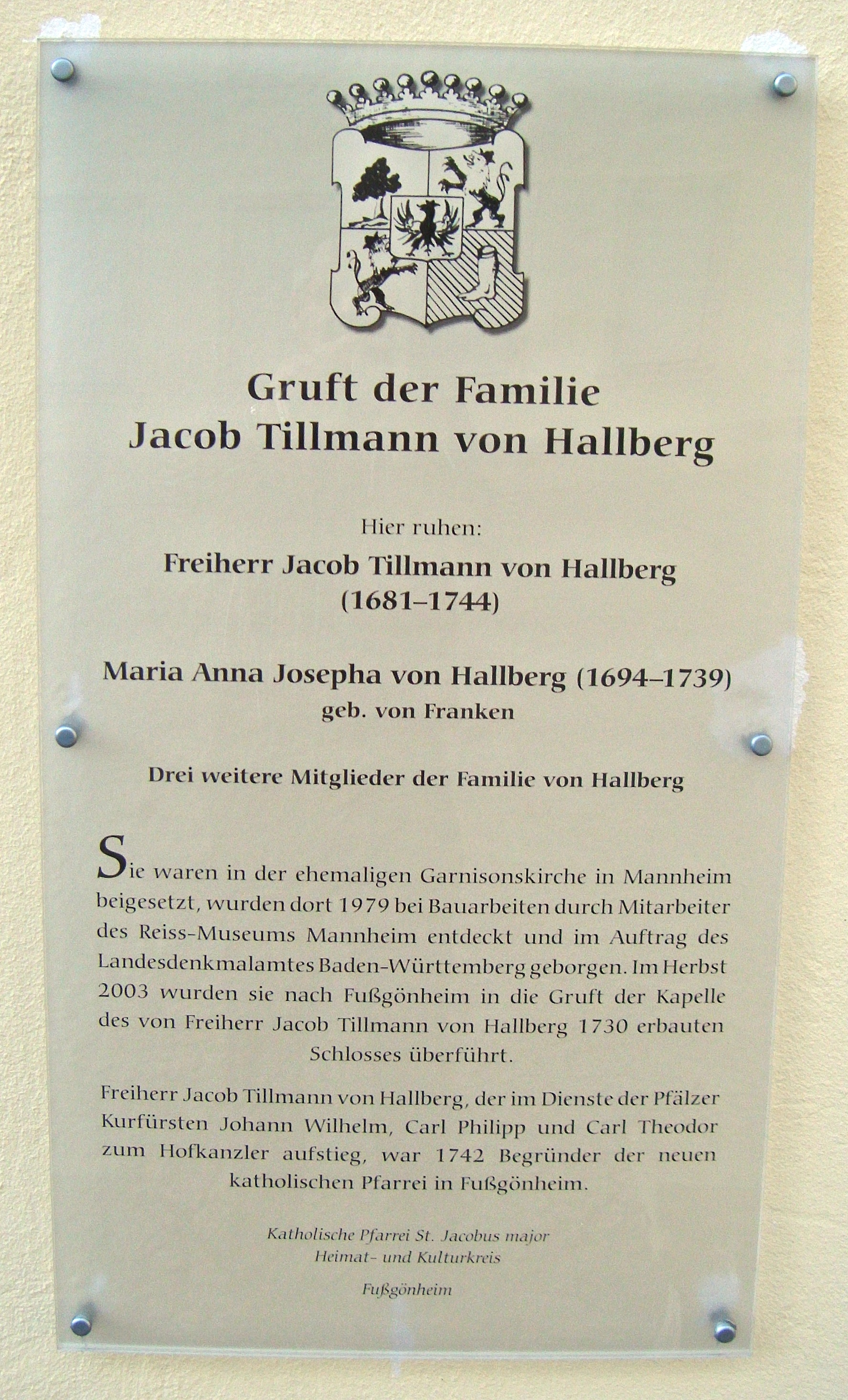 Hallbergsches Schloss Fußgönheim, Gedenktafel an der Hallberg-Gruft